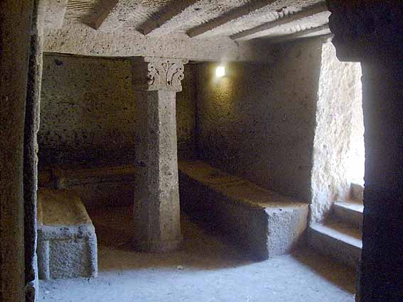 Tomba dei Capitelli, Necropoli della Banditaccia, Cerveteri. Tomba a tumulo etrusca, inizio del VI secolo a.C. Interno: veduta parziale dell'atrio che si apre al termine del dromos, con una delle due colonne a fusto sfaccettato e capitello eolico.